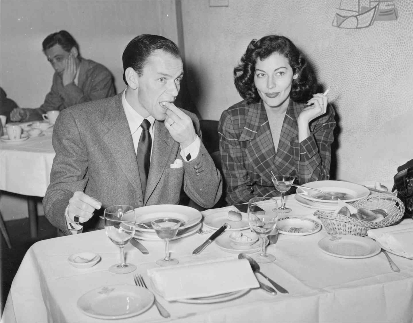 Frank Sinatra en Ava Gardner aan tafel in het restaurant van Schiphol, 13 december 1951 Foto Ben van Meerendonk / AHF, collectie IISG, Amsterdam Foto gepubliceerd in Het Vrije Volk, 14 december 1951, pagina 9, waarbij de man achter Sinatra is weggeretoucheerd.